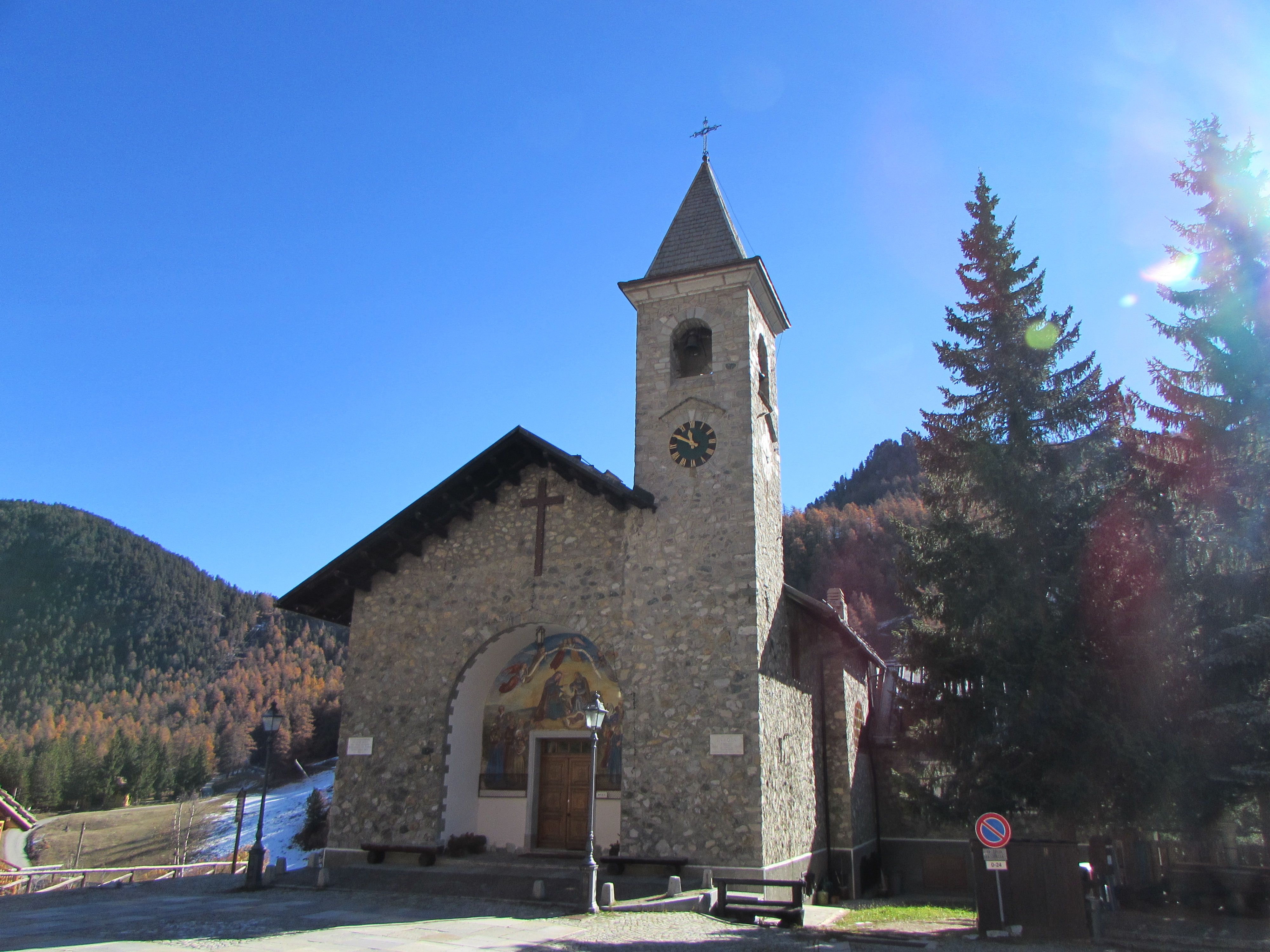 Chiesa Parrocchiale